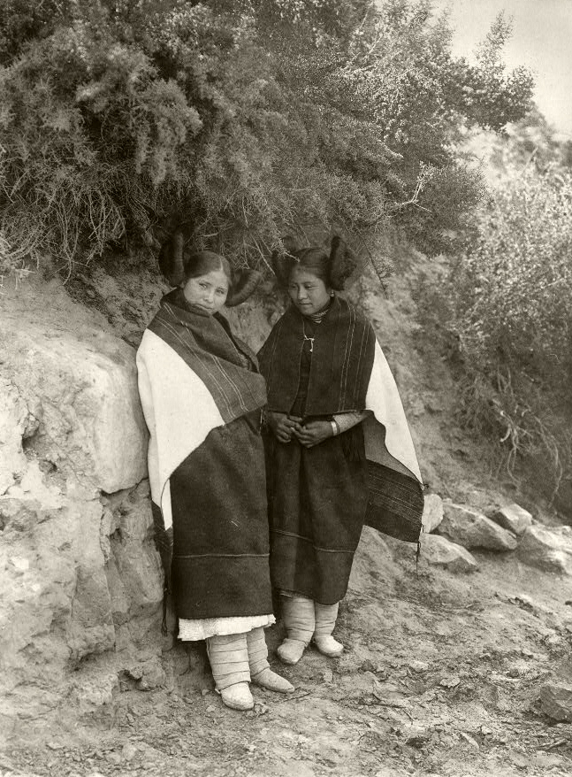 Zwei Hopi-Mädchen, Edward Curtis, 1922.